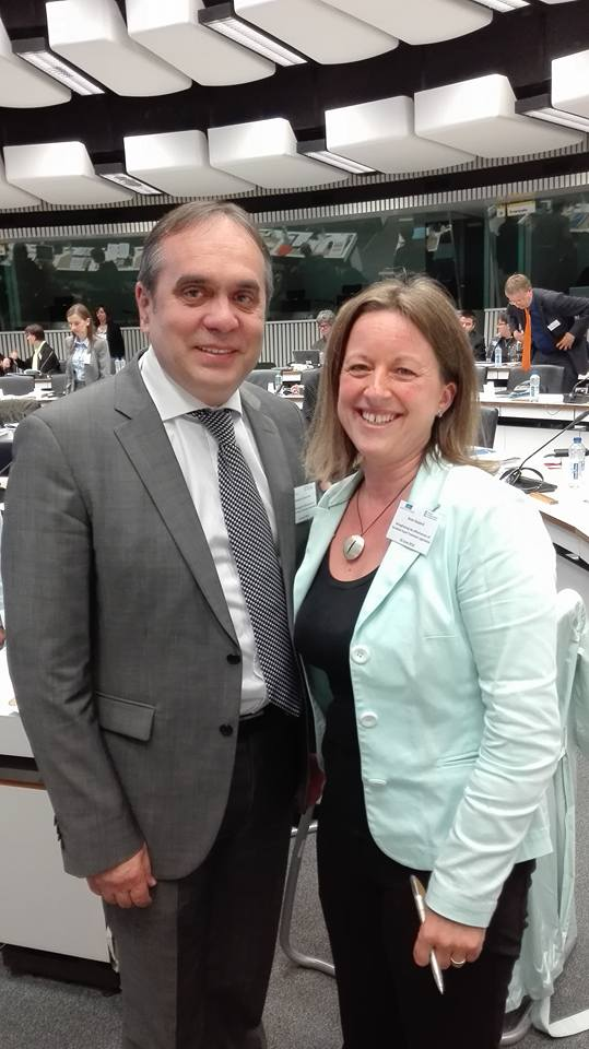 проф. Даштевски со извршната директорка на ЕКВИНЕТ, Ана Гаспард.